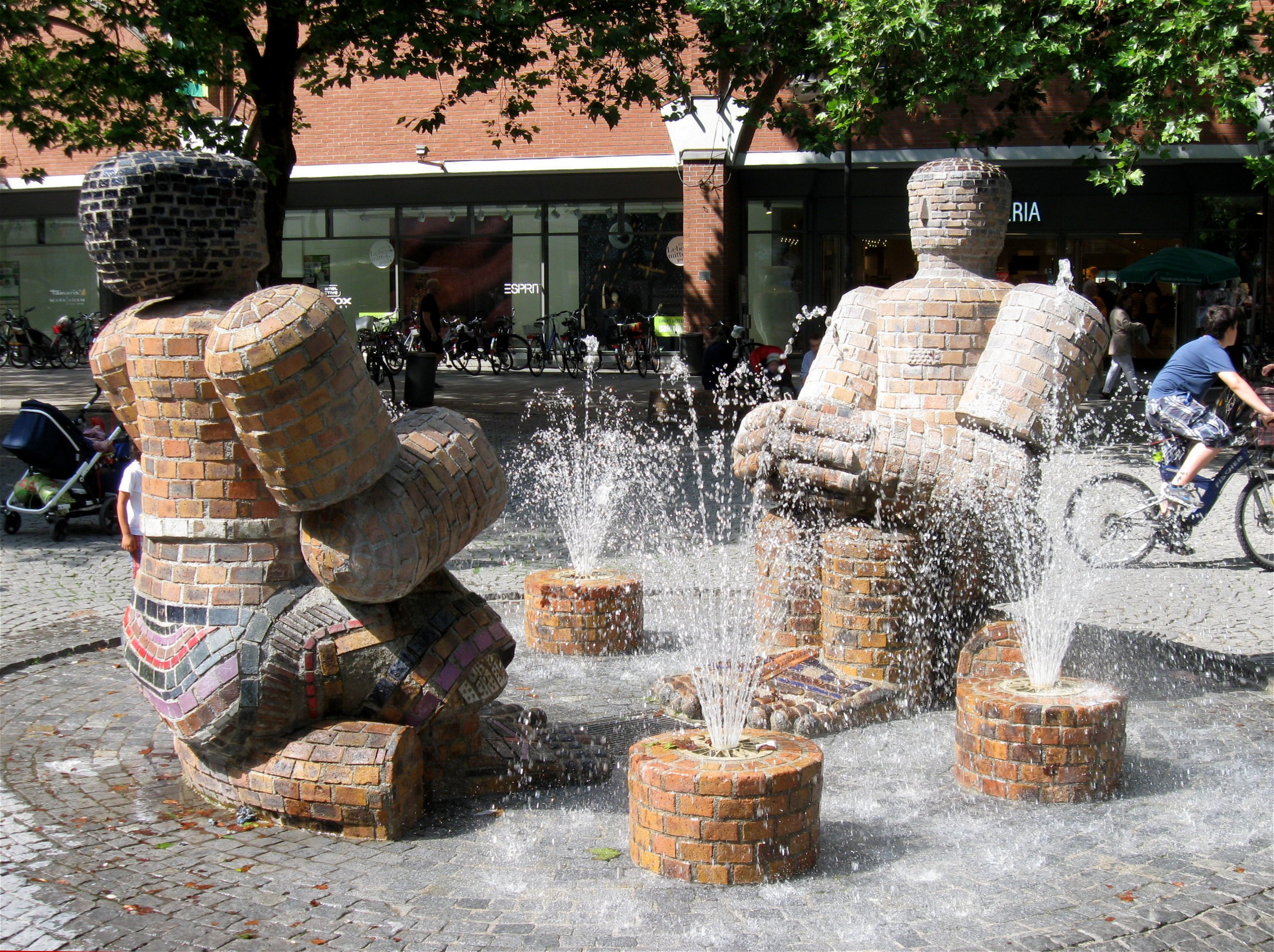 Steinernes Paar, Brunnen von Klaus Schultze, Rotkreuzplatz, München